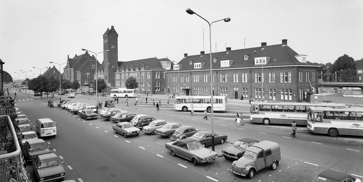 Station Nederlandse Spoorwegen: overzicht